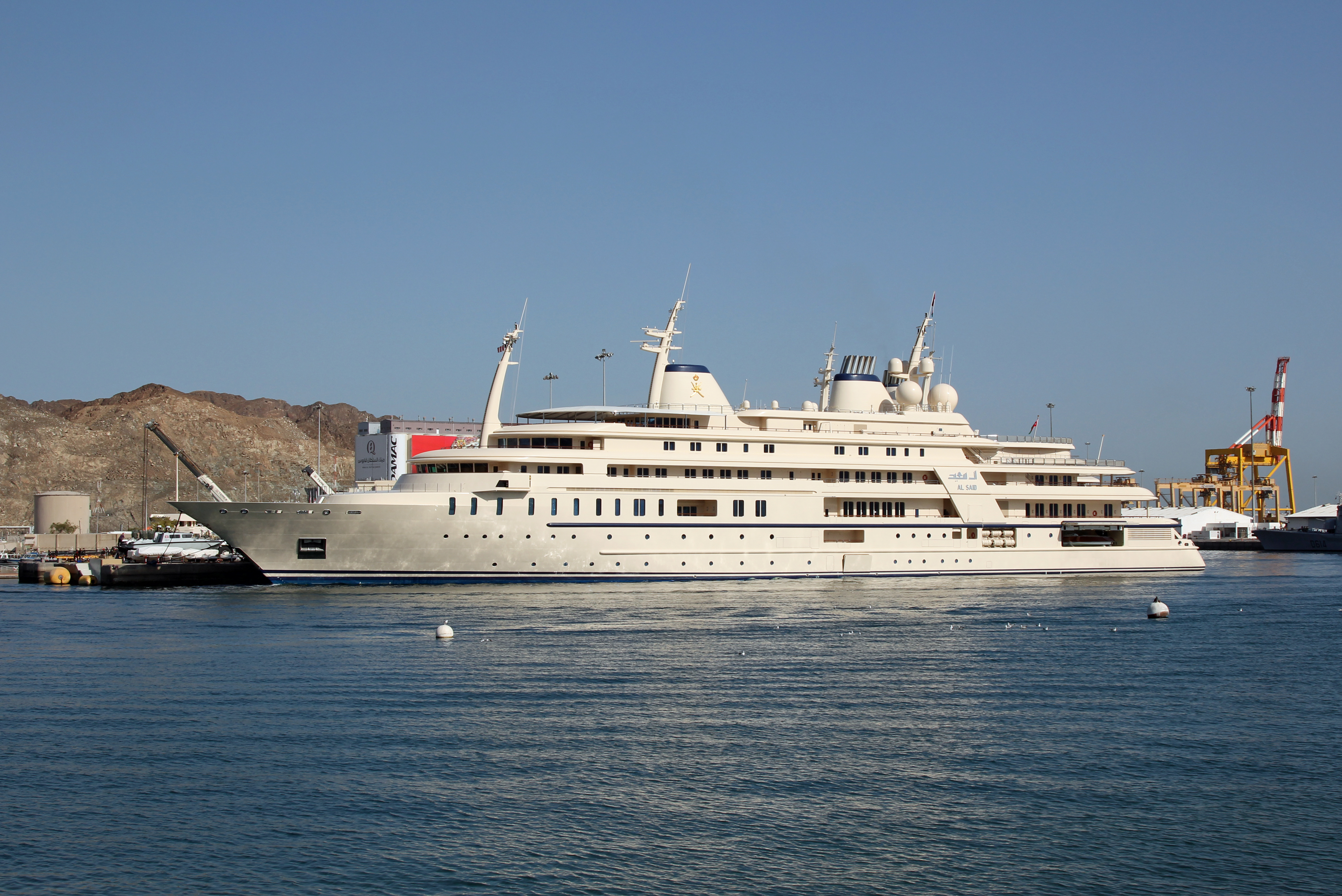 Muttrah, Oman.